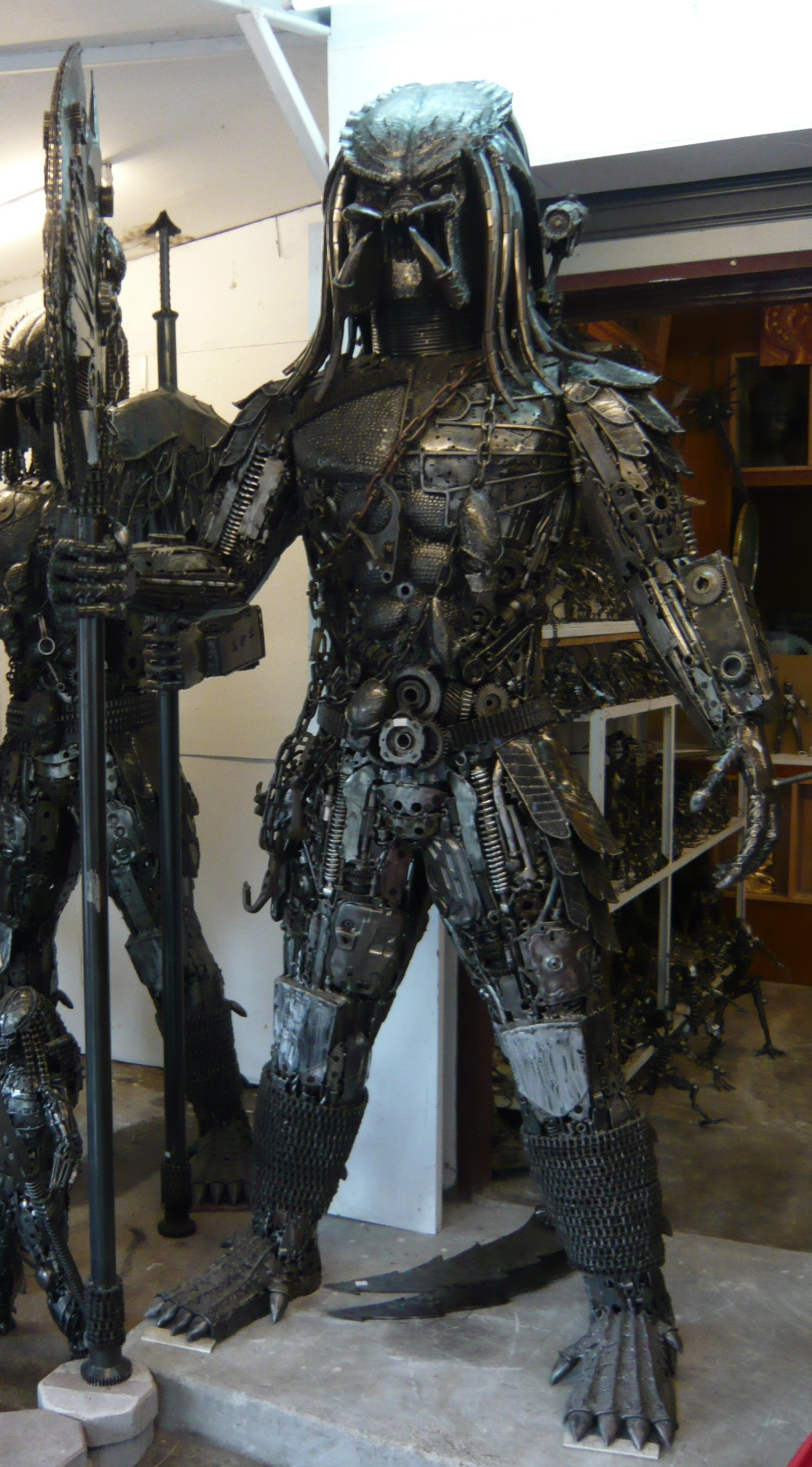 A life-sized Predator sculpture on Koh Samui.